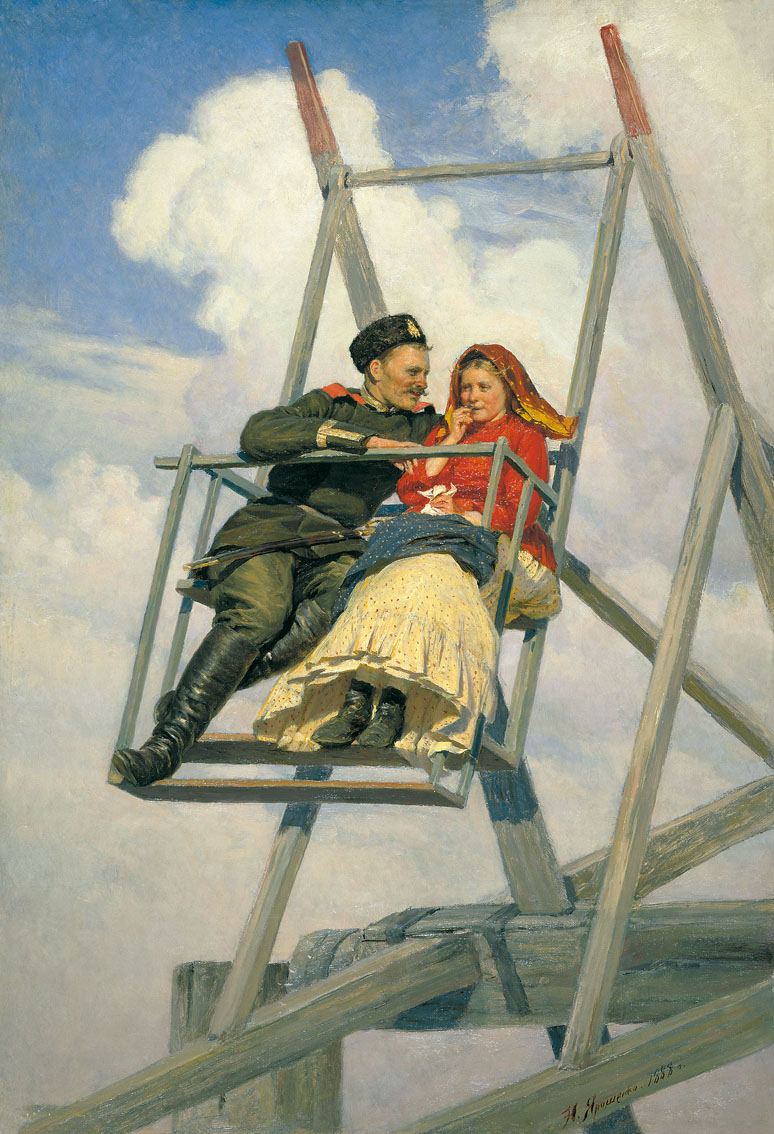 Небольшая жанровая картина Н. А. Ярошенко «На качелях» была представлена на Передвижной выставке 1889 года.